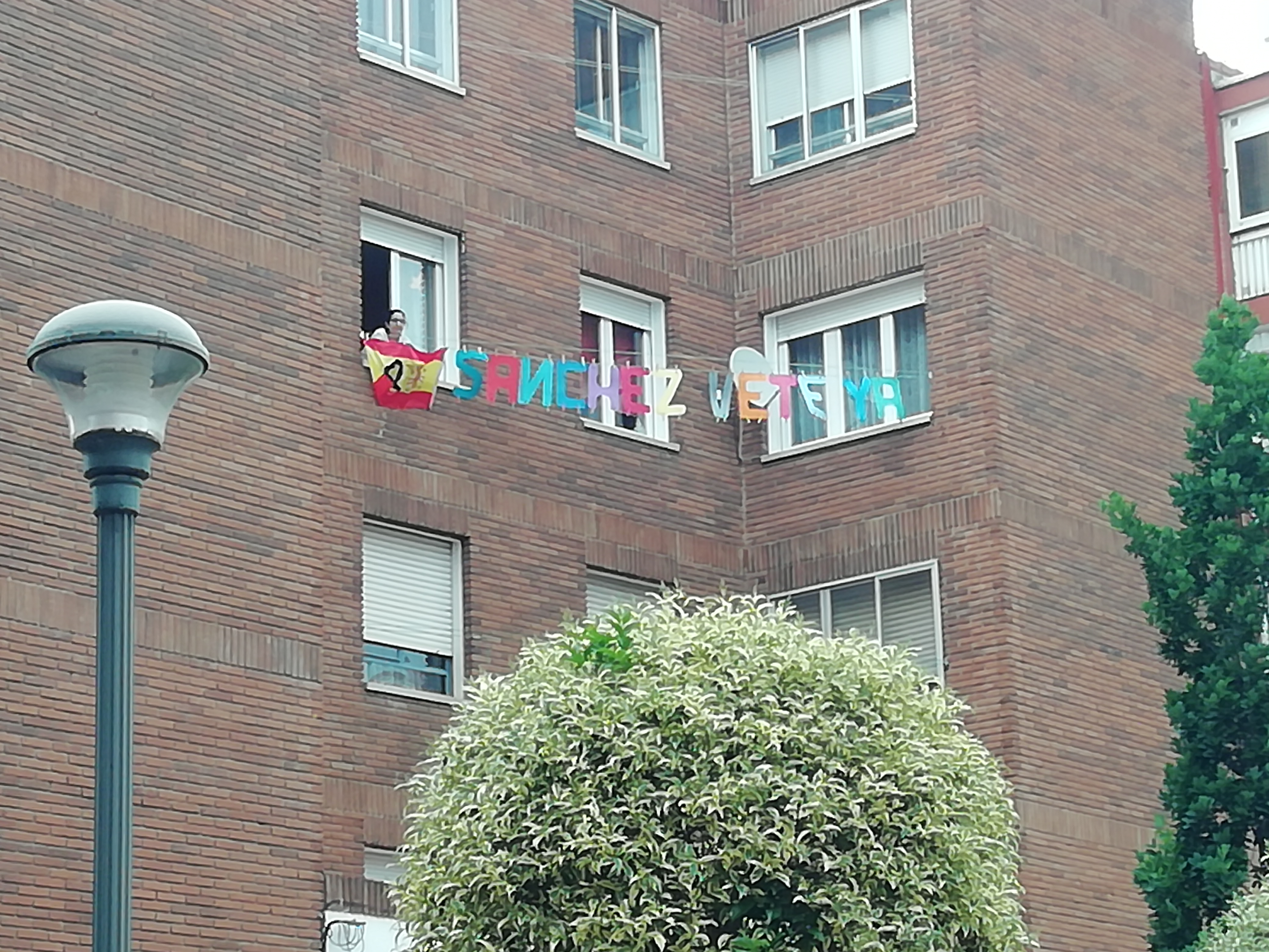 Protesta contra el gobierno durante la pandemia de COVID-19, Valladolid (España)